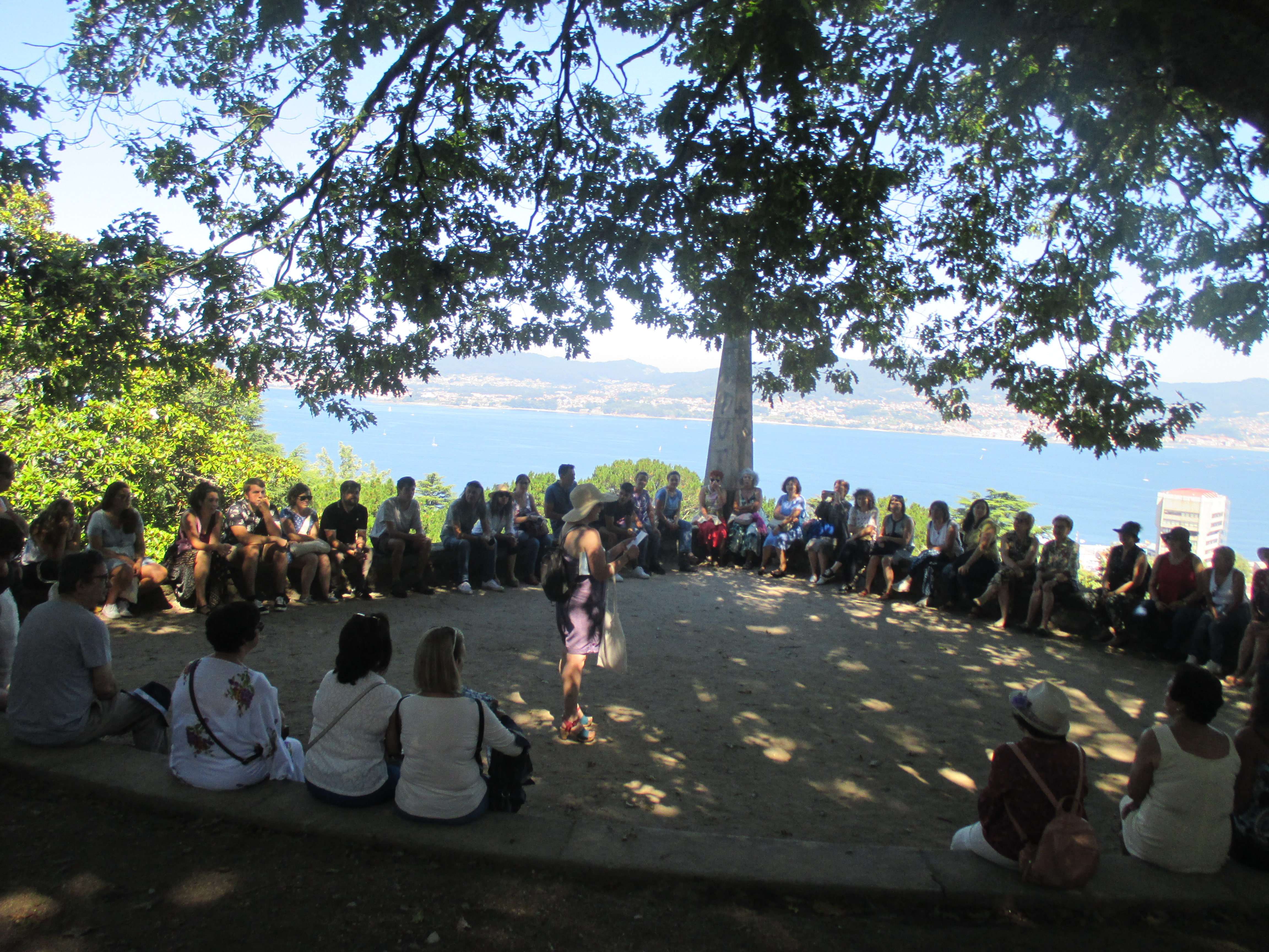 Celebración do Día das Galegas nas Letras en 2019 dedicado a Xela Arias no monte do Castro en Vigo.